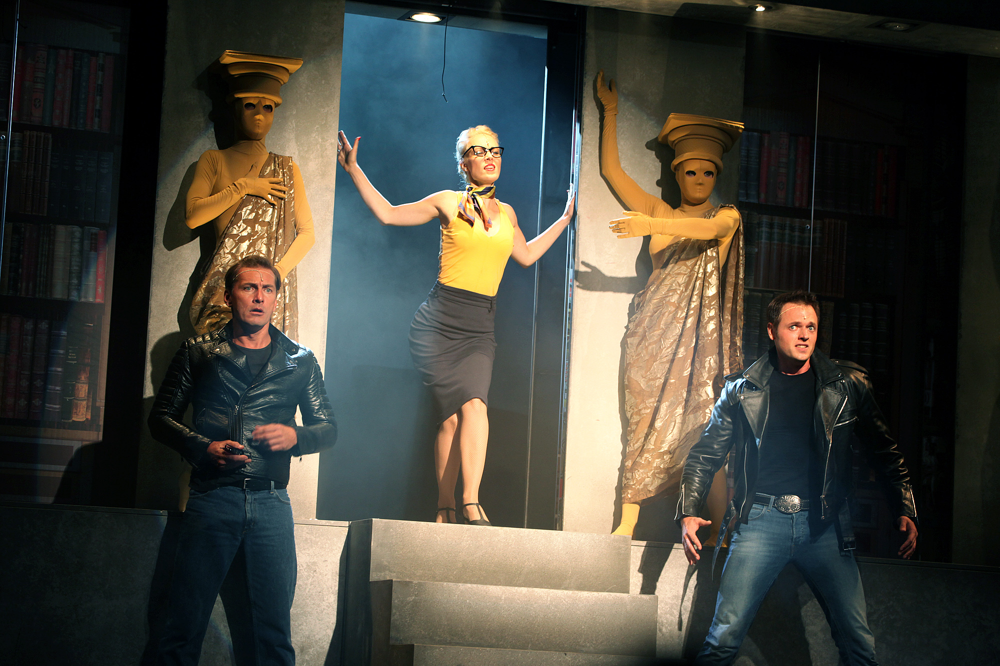 Role Sandry v muzikálu Srdcový král v divadle Kalich